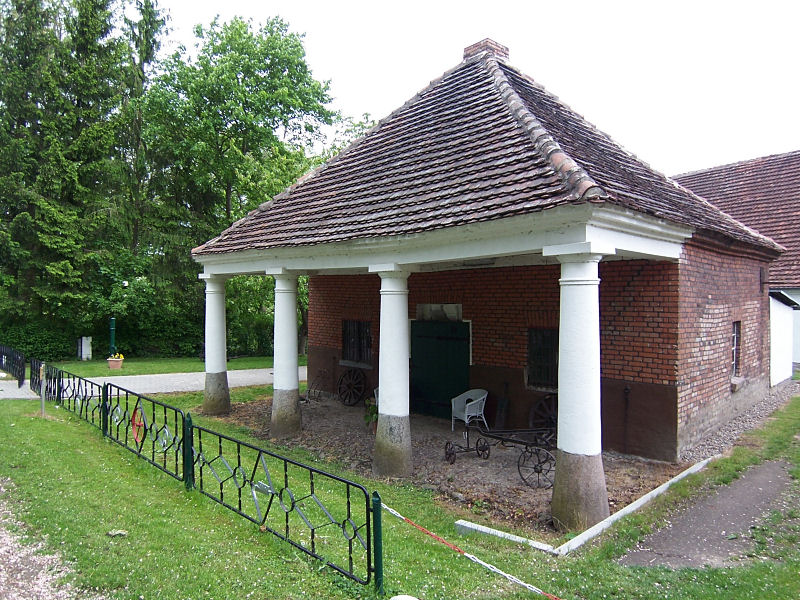 Alte Dorfschmiede in Reez, angeblich wurden hier die Pferde Napoleons beschlagen